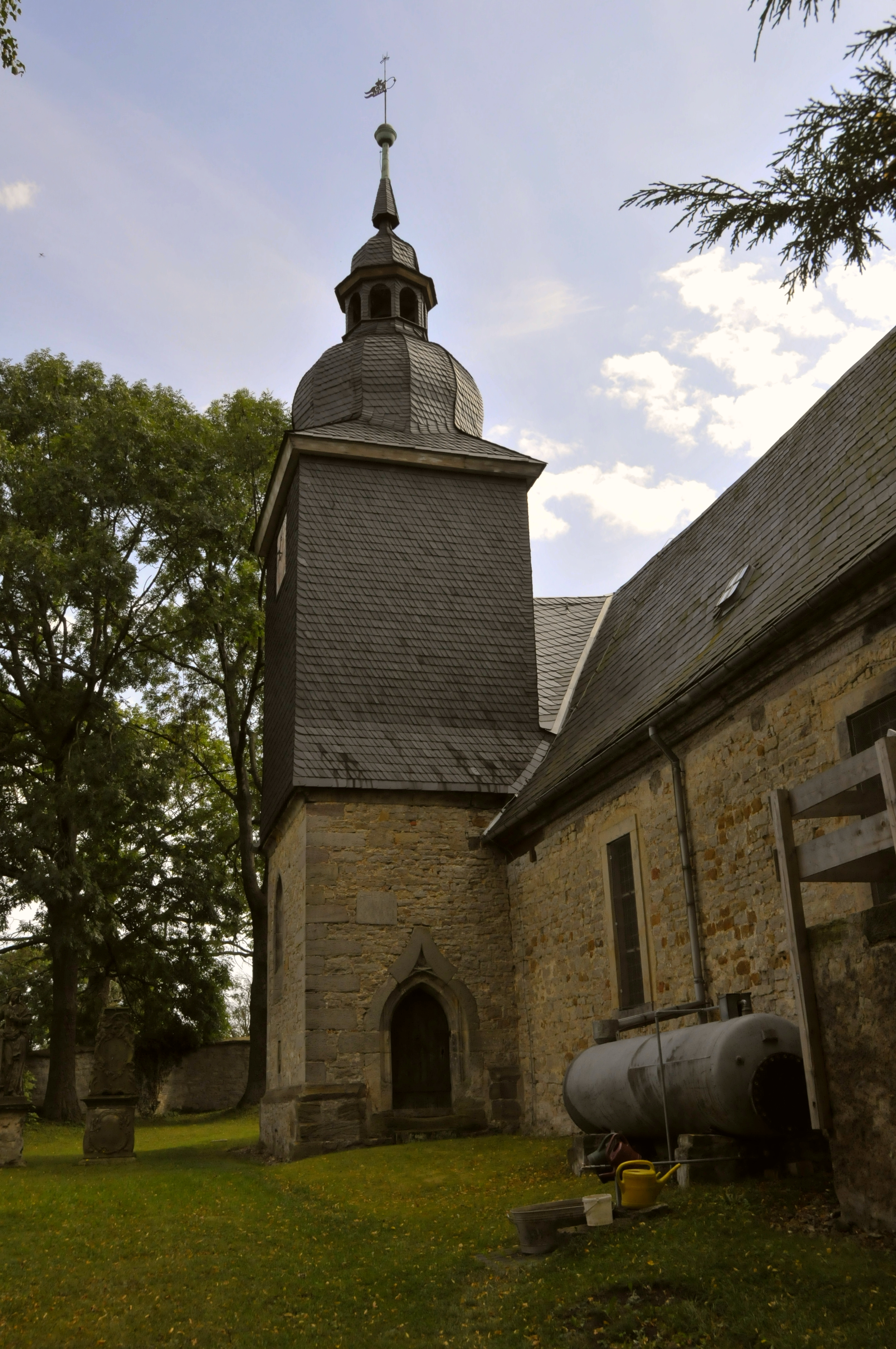 Alkersleben, Kirchturm